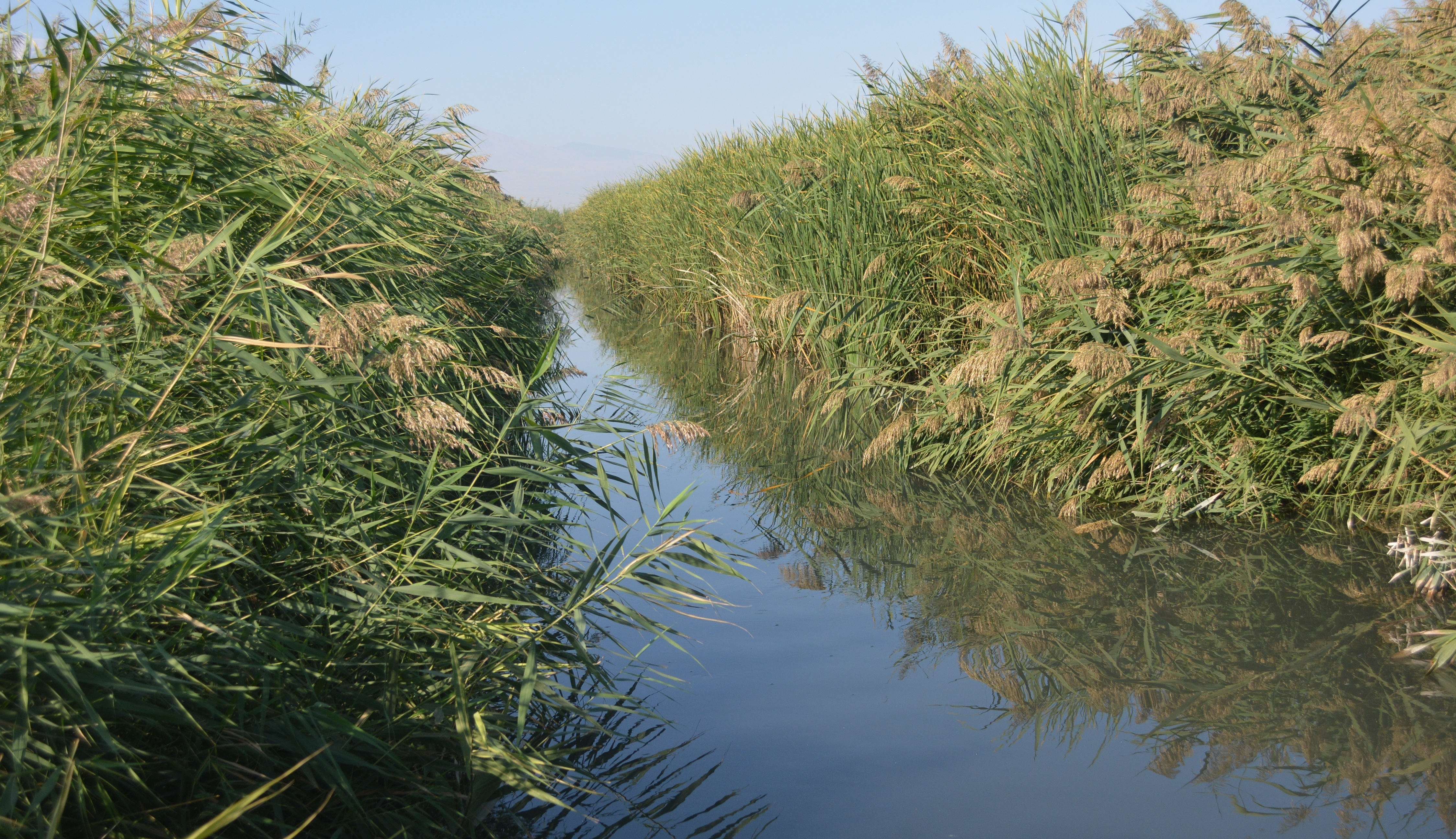 Փոքր վեդի